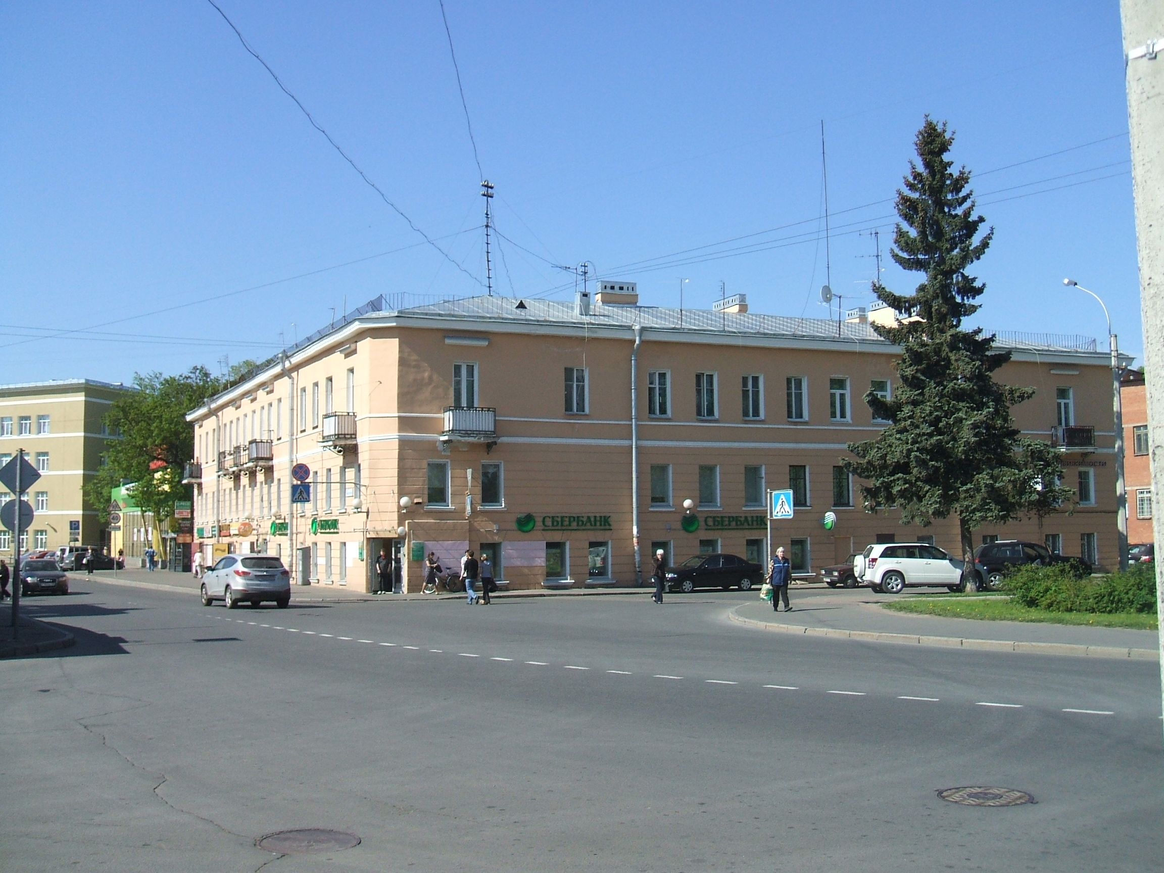 Сестрорецк. Улица Володарского, старейший дом Сестрорецка (дом купца Слободского)